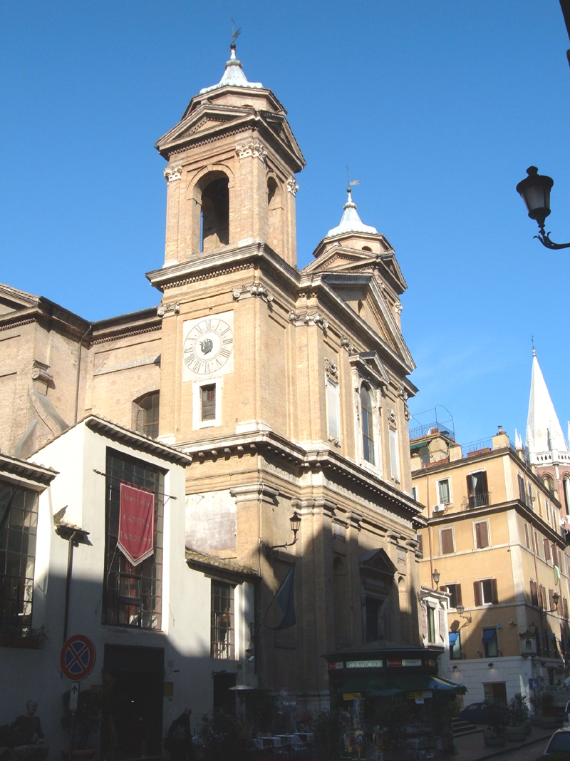 Chiesa di Sant'Atanasio dei Greci, a Roma, nel rione Campo Marzio, in via del Babuino. Foto personale.